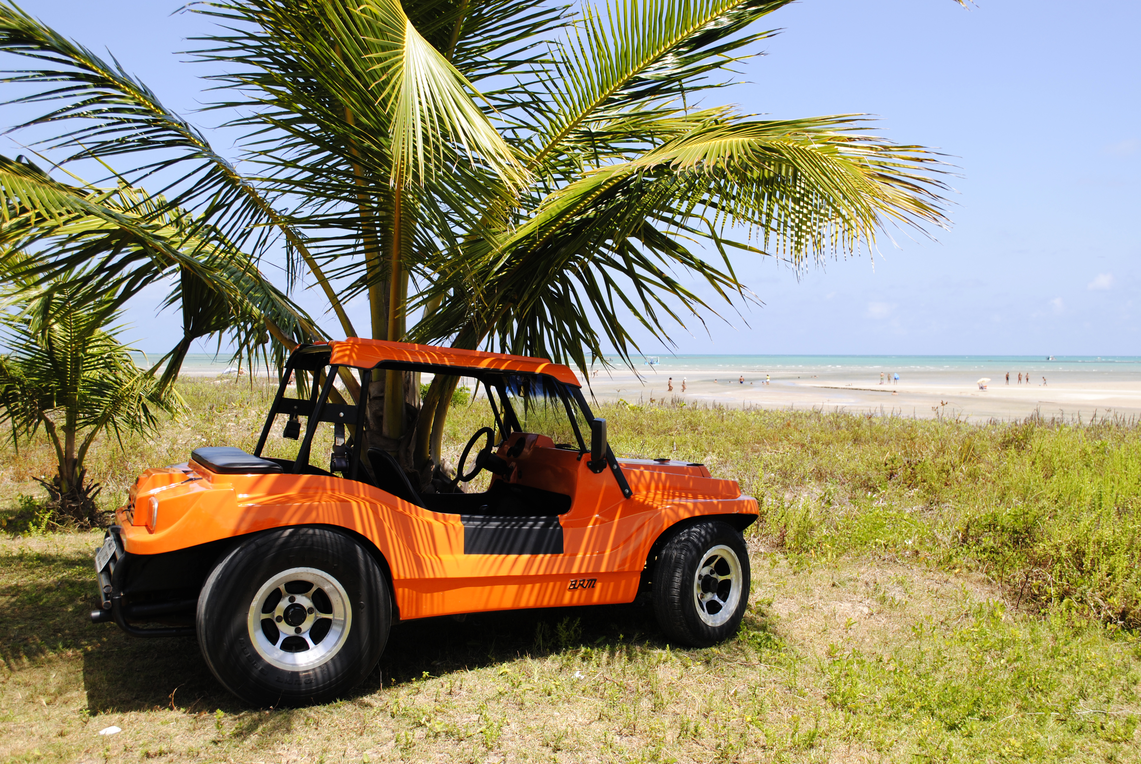 verde e laranja